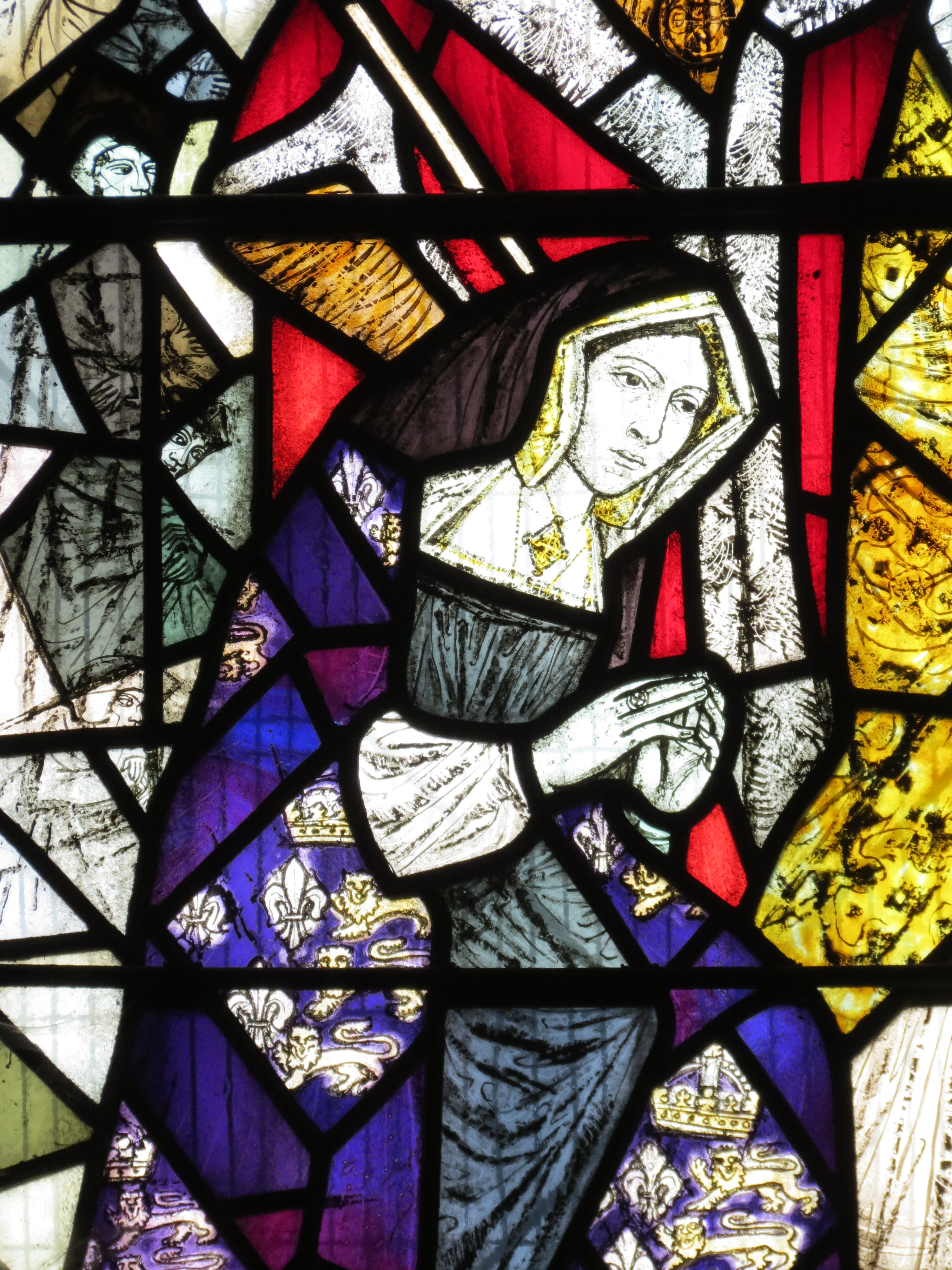 Détail du vitrail représentant la reine Catherine d'Aragon, femme d'Henri VIII.